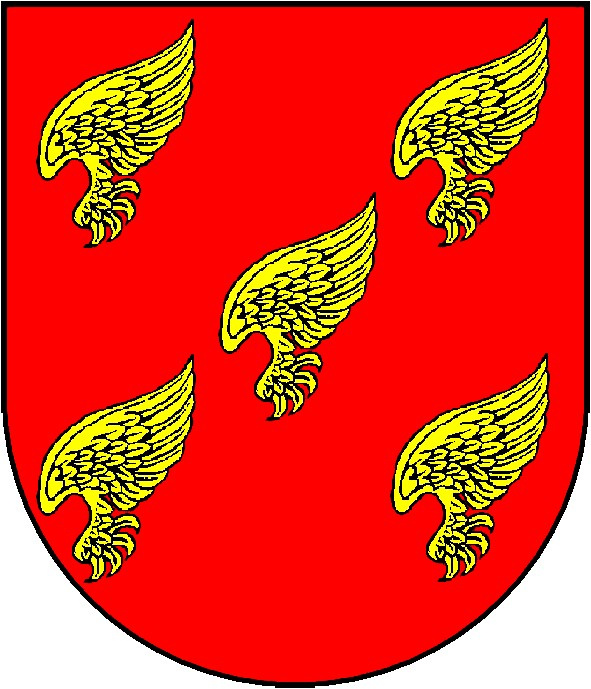 Escudo da Família Abreu